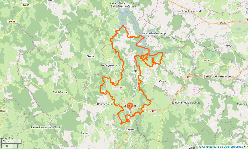 Le Rouget-Pers Limite communale This map may be incomplete, and may contain errors. Don't rely solely on it for navigation.